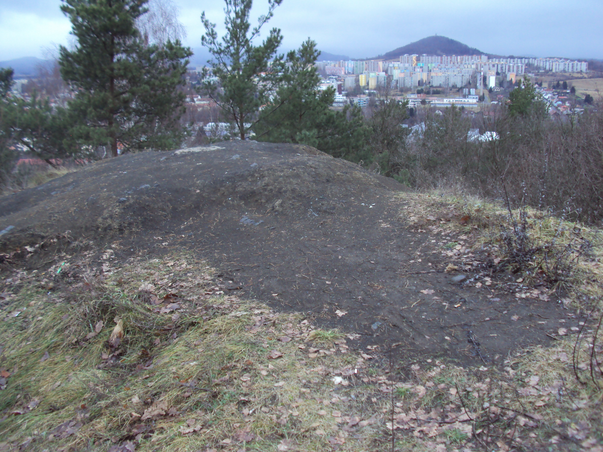 Česky: Vrchol kopce Hůrka v České Lípě